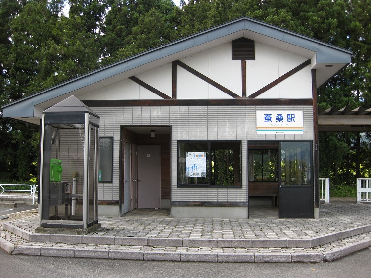 koguwa station1蚕桑駅